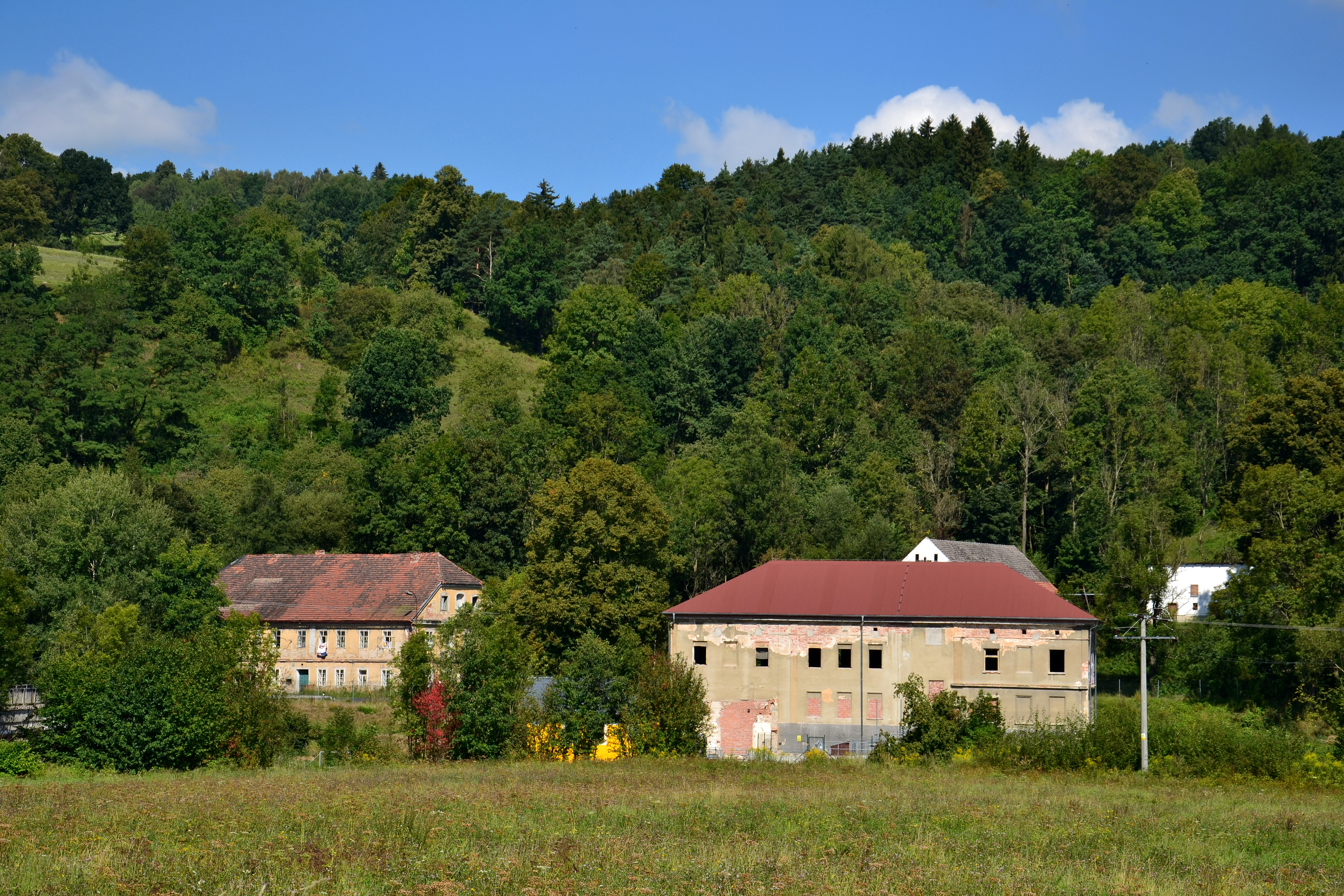 Domy čp. 27 a 28